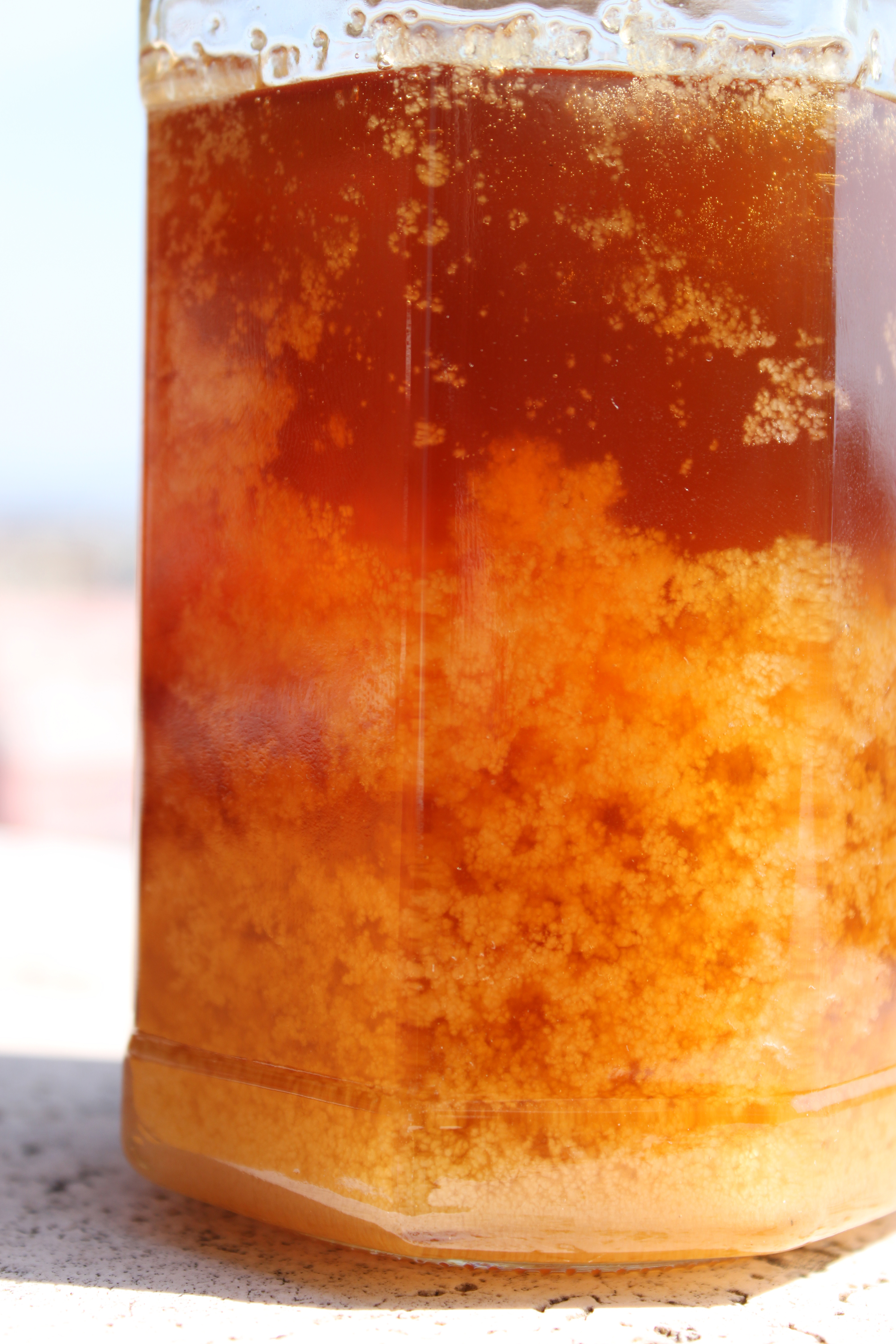 Cristallizzazione del miele (miele millefiori biologico italiano)